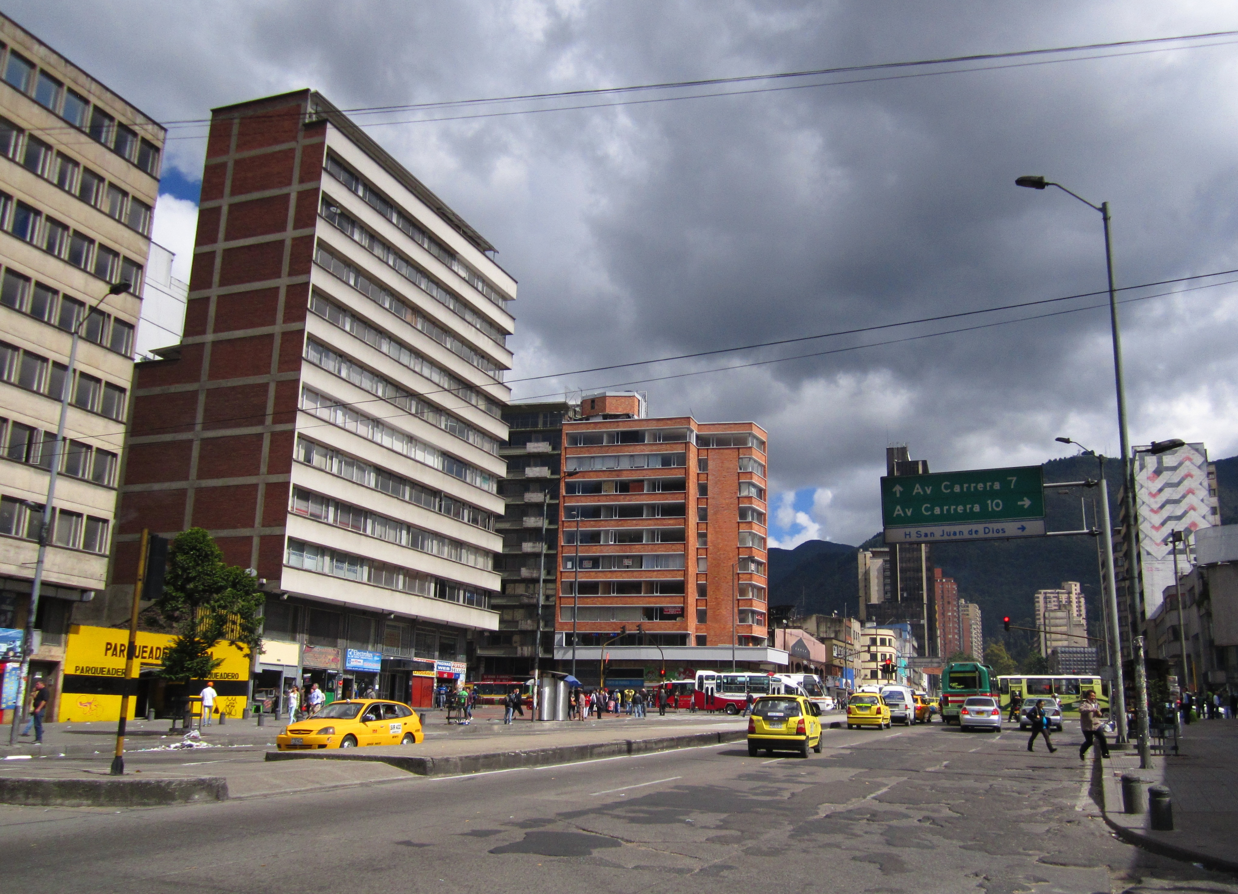 Avenida Ciudad de Lima (calle 19) con carrera 12, límite entre La Capuchina (derecha) y La Alameda (izquierda) de la localidad de Santa Fe. Ciudad de Bogotá.